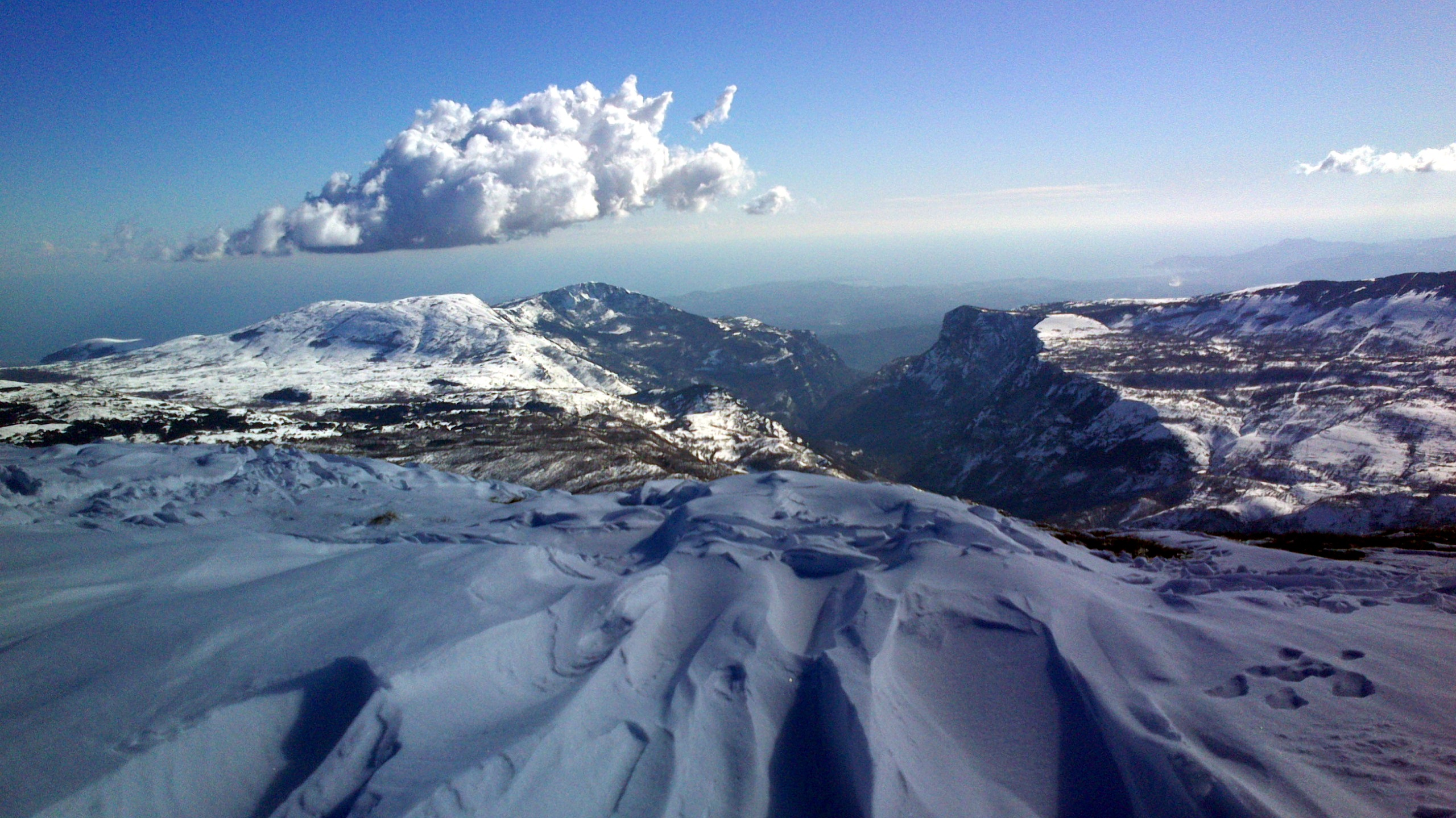 Cime du cheiron à Gréolières les Neiges, vue sur la vallée du Loup (février 2013)